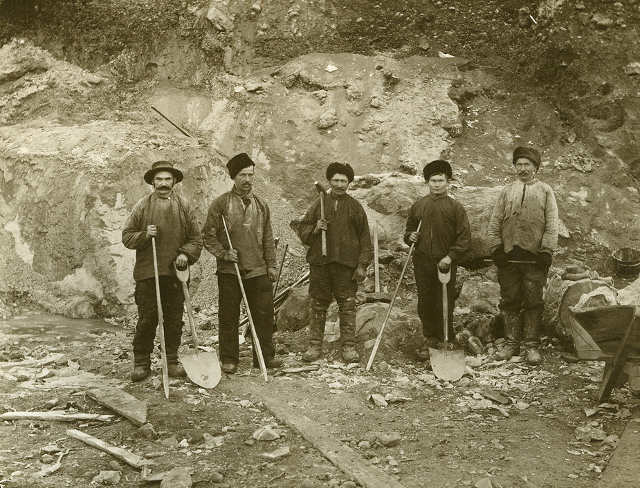 Wessel, Ellisif Rannveig Gruppeportrett av fem arbeidskarer. Kirkenes 1907. NMFF.002147